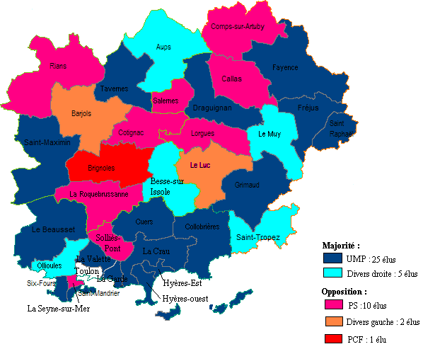 Répartition politique des conseillers généraux du Var en fonction de leur canton.